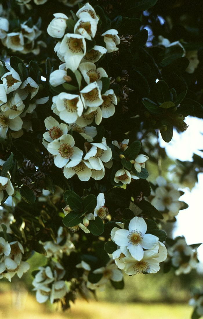 Eucryphia cordifolia, Cunoniaceae - Chile, 15 km W Entre Lagos (Prov. de Osorno)